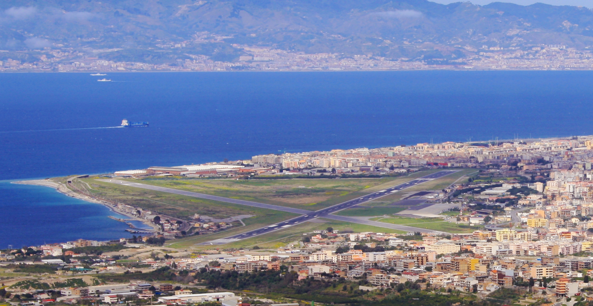 Veduta dell'aeroporto "Tito Minniti" di Reggio Calabria.